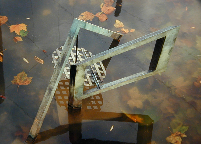 Reflet sans anamorphose. Sculpture en bronze. Parc de la Villette Paris